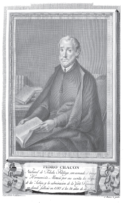 Retrato de Pedro Chacon.